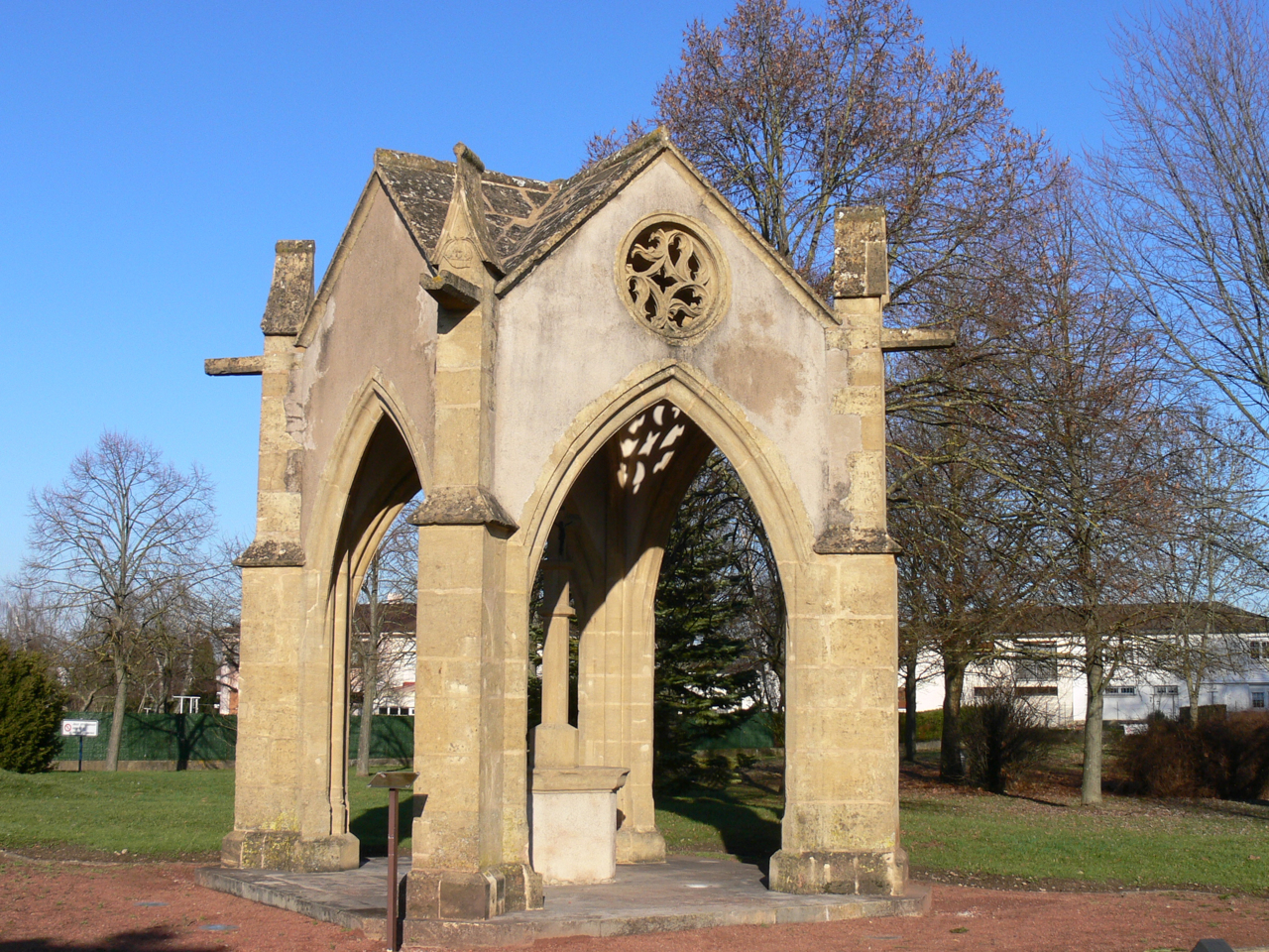 Belle-Croix, monumentale croix de chemin au croisement de la route de Metz à Thionville et de Ennery à Hauconcourt